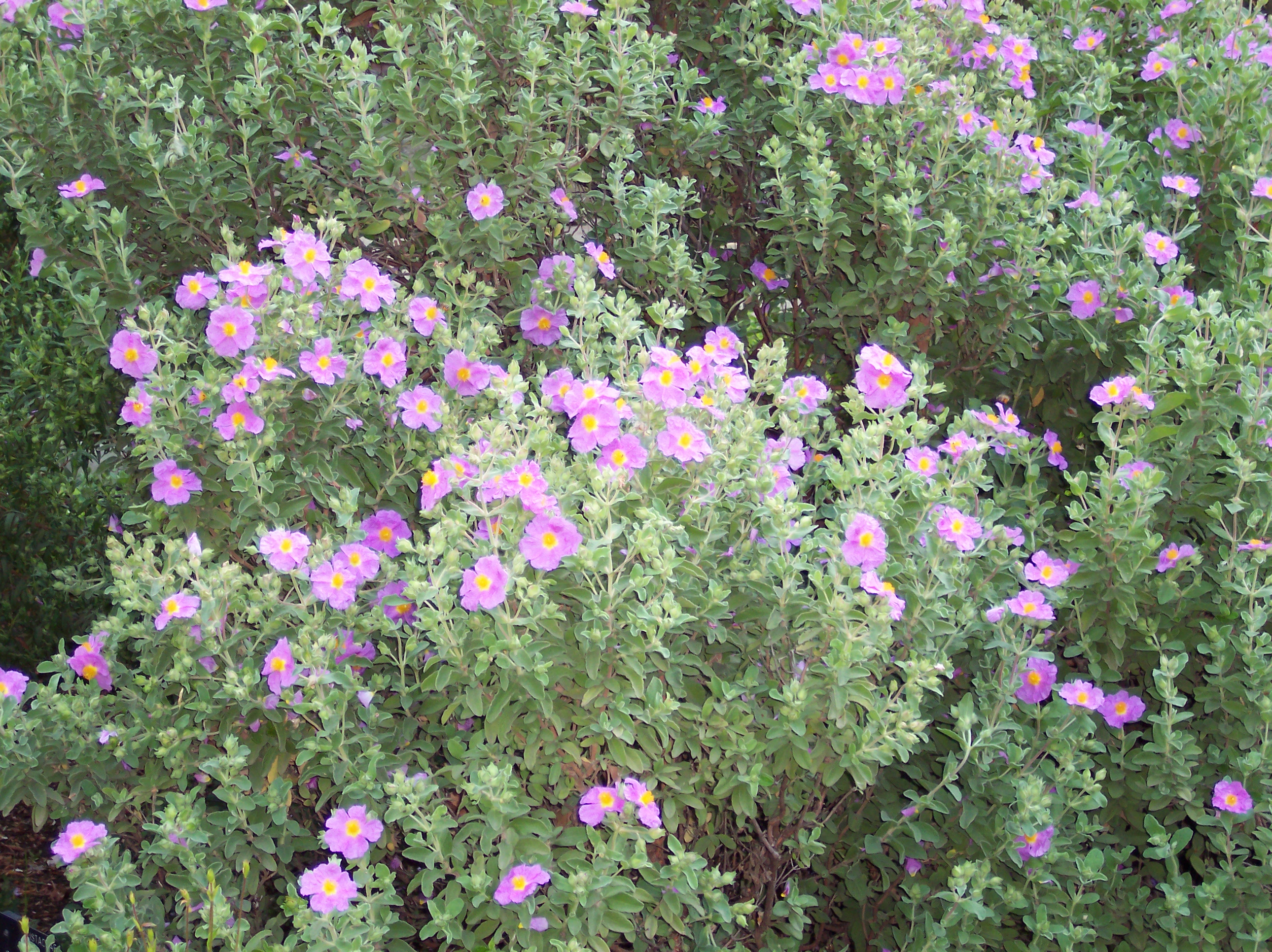 Cistus creticus. Real Jardín Botánico, Madrid